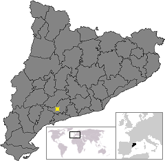 Localització de Valls. Location of Valls in Catalonia.